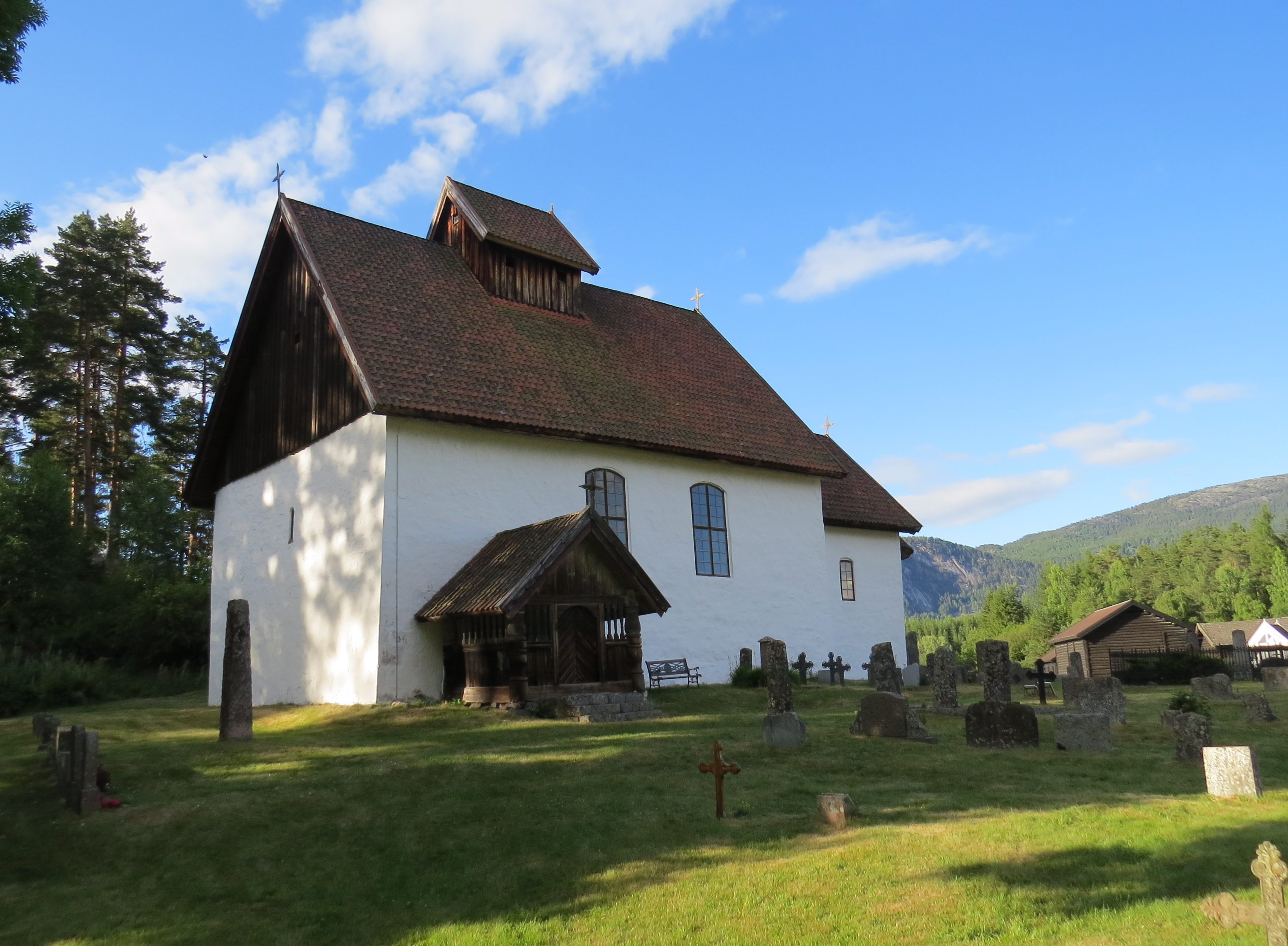 Kviteseid middelalderkirke, Telemark